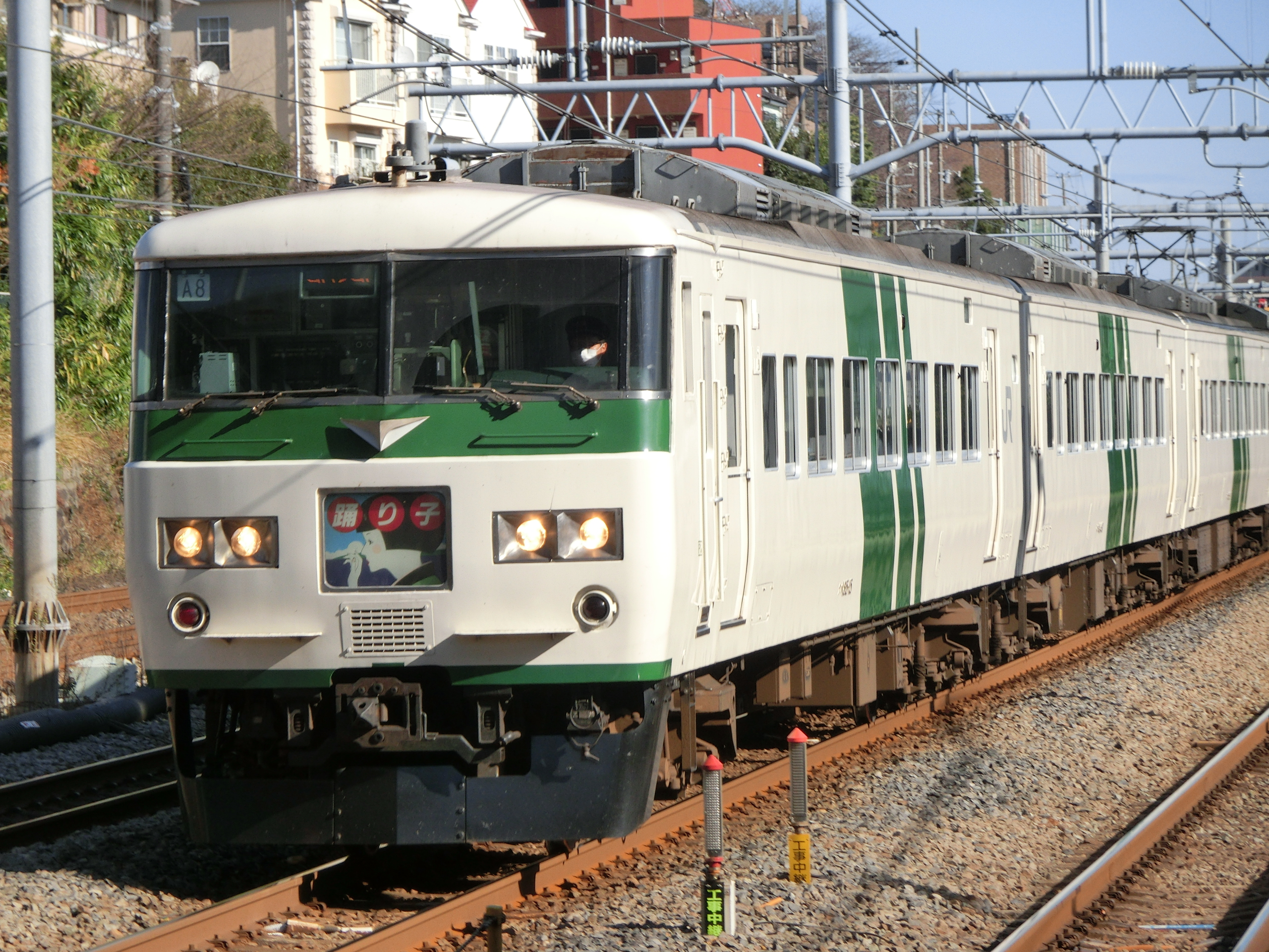 新子安付近